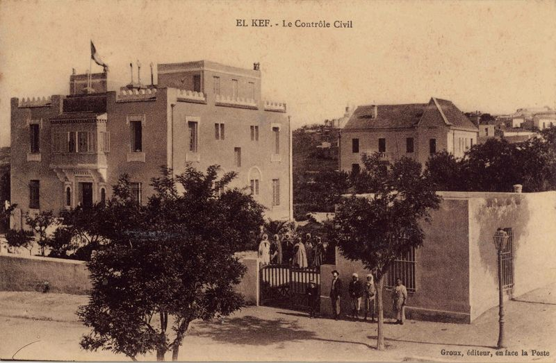 Contrôle civil du Kef vers 1916